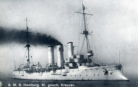 Kleiner Kreuzer Hamburg, 25.07.1903